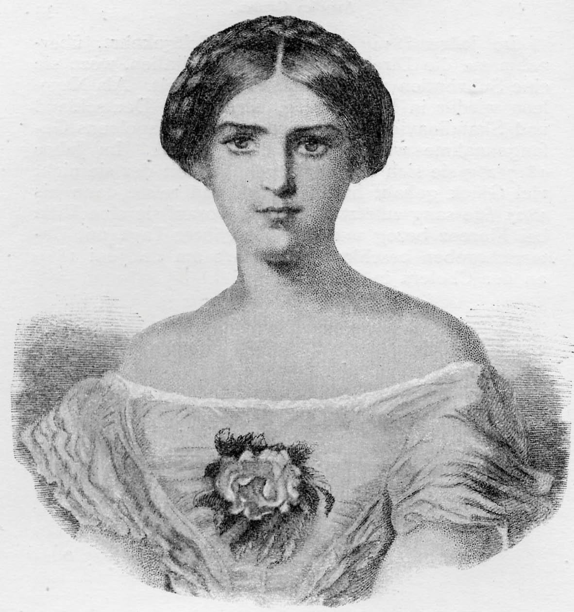 Sophie Cruvelli